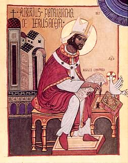 Икона святого Альберта, латинского патриарха Иерусалима. Автор неизвестен.